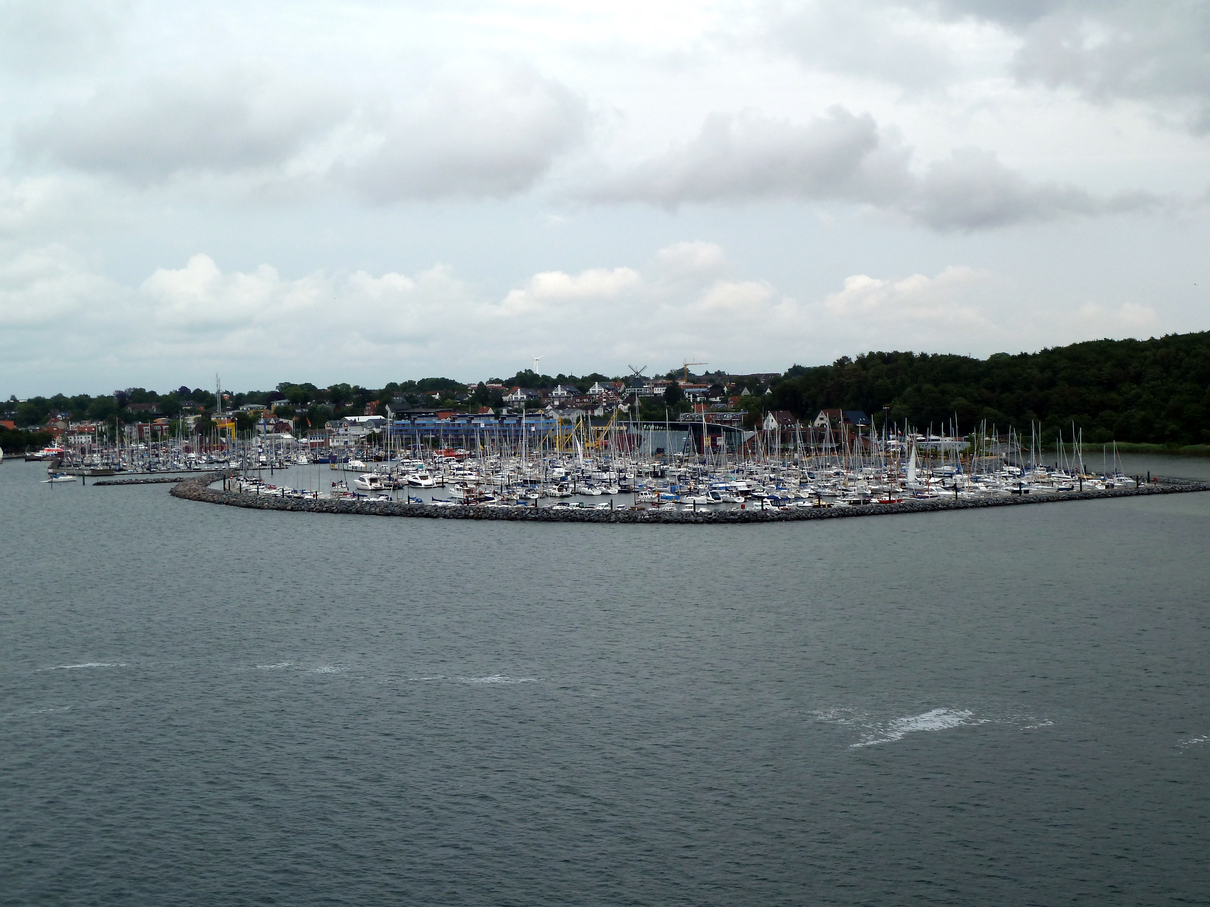 2010-07-28 - Kieler Förde - Hafen Laboe - Baltic Bay